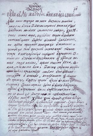 Ерминия на Дичо Зограф от Центъра за славяно-византийски проучвания - Лист 176а